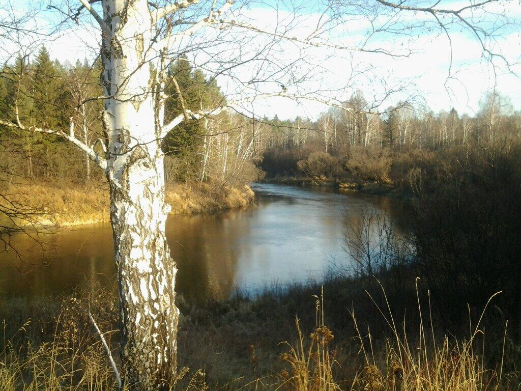 Река Уй